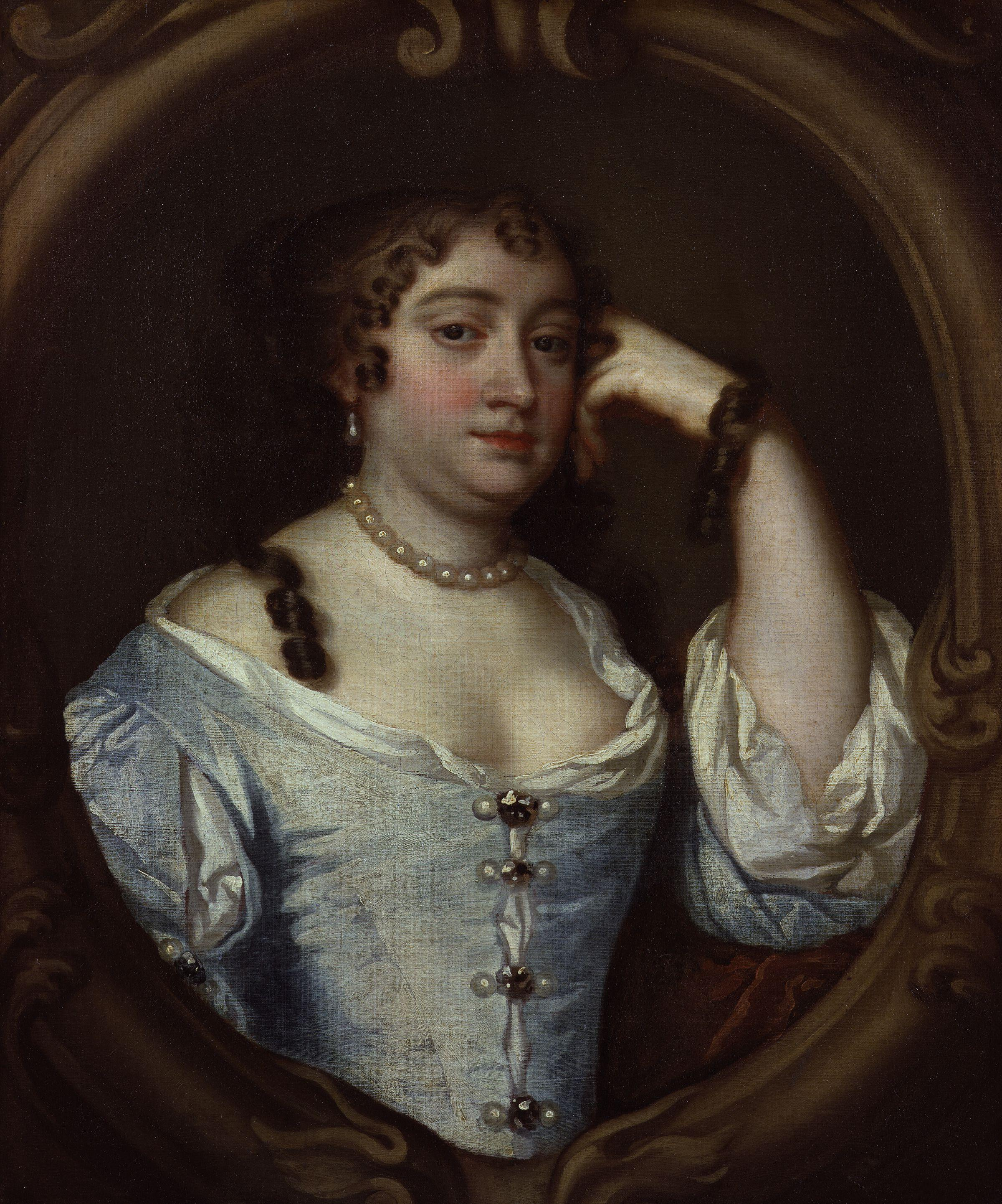 Anne Hyde, Duchess of York, after Sir Peter Lely (died 1680).